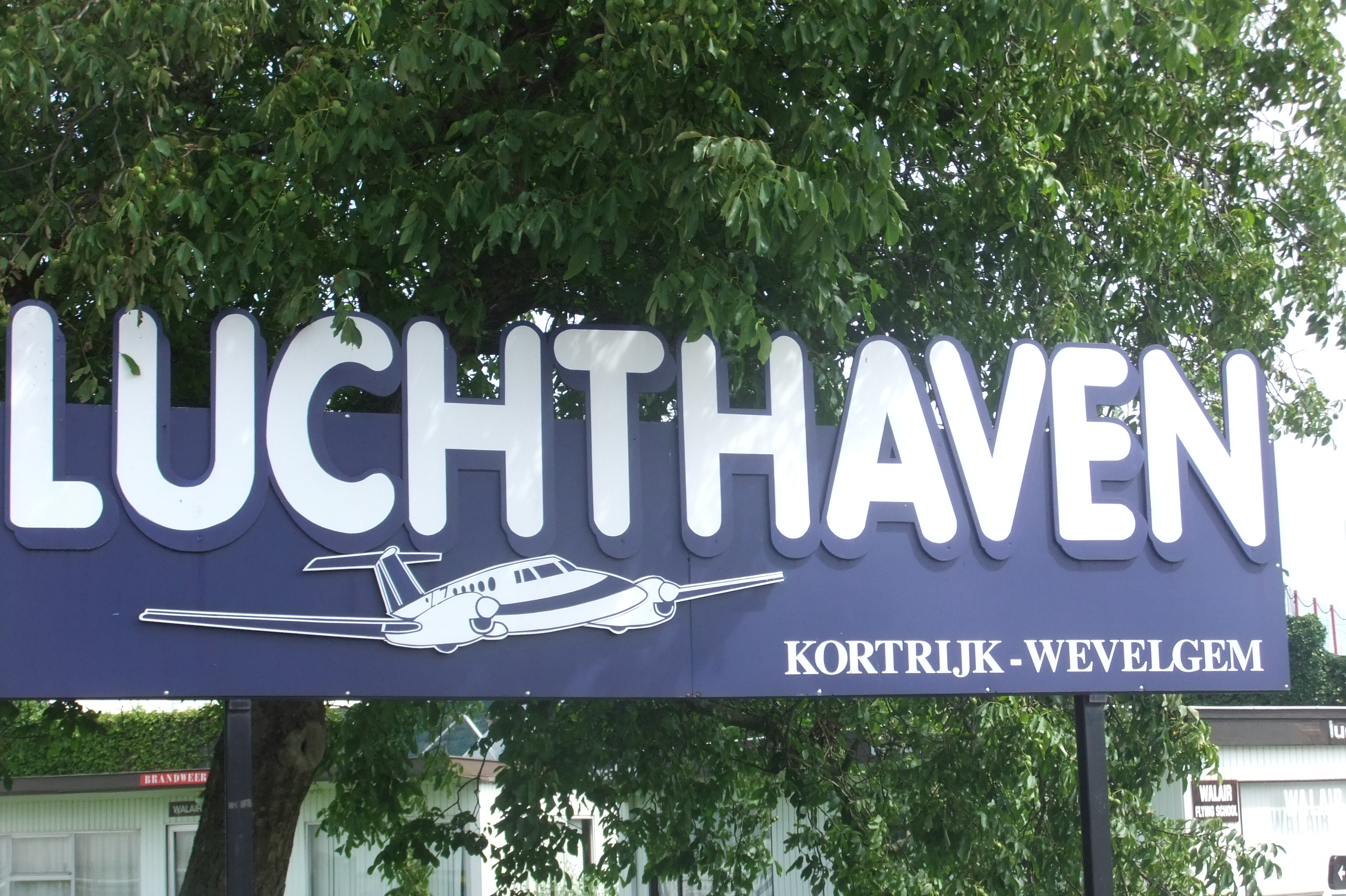 Luchthaven Kortrijk Toegangsbord